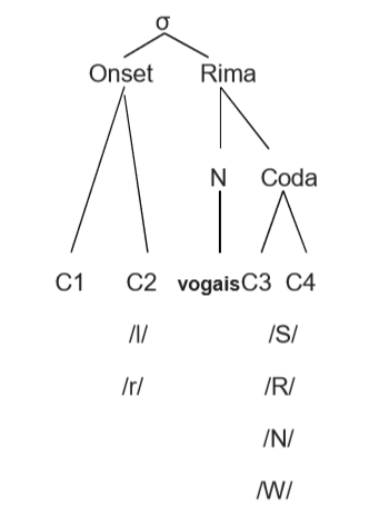 Elementos que ocupam cada configuração da sílaba em português